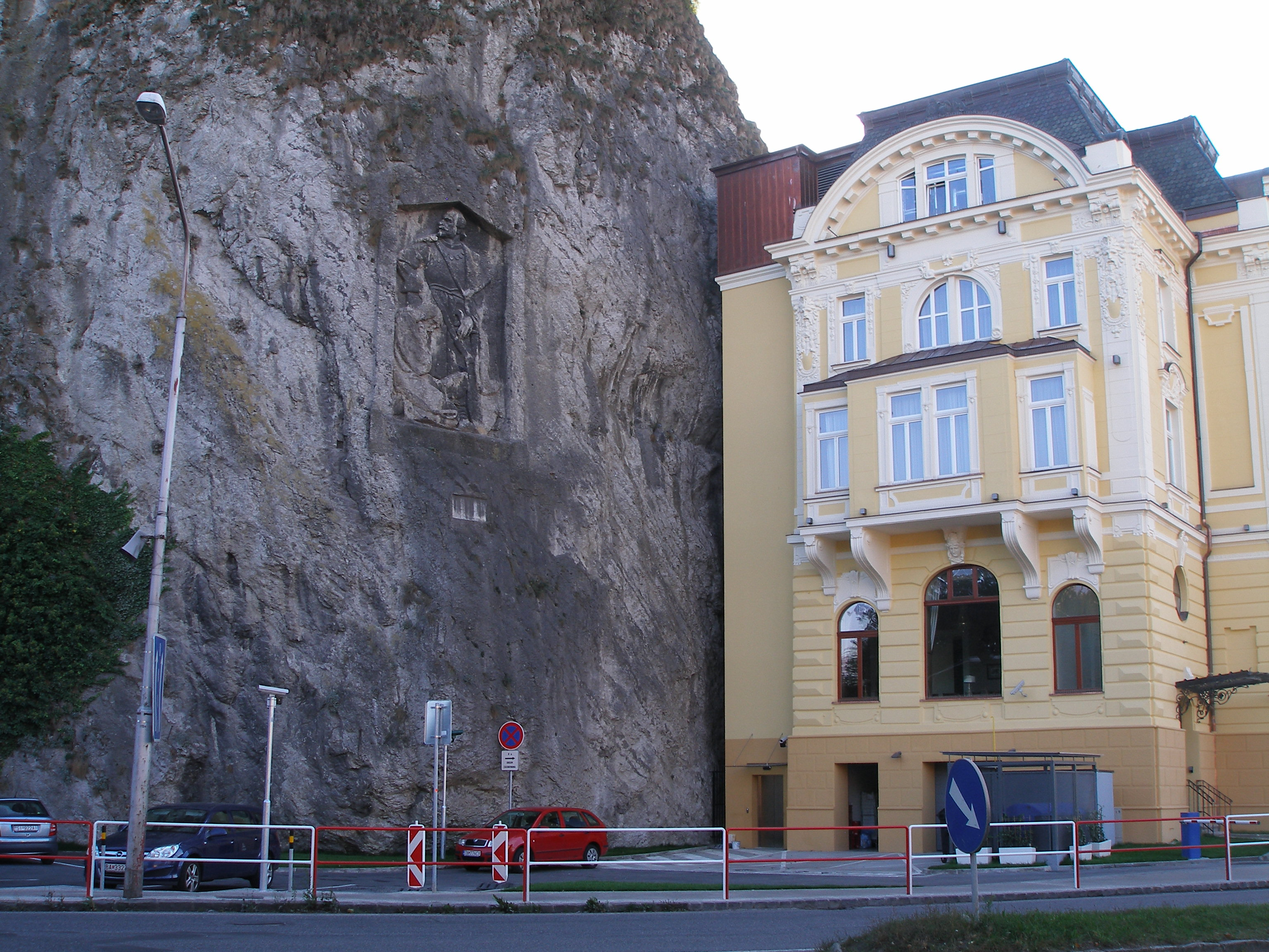 Reliéf Jana Jiskry z Brandýsa na skále pod Trenčínským hradem (pohled od severovýchodu).